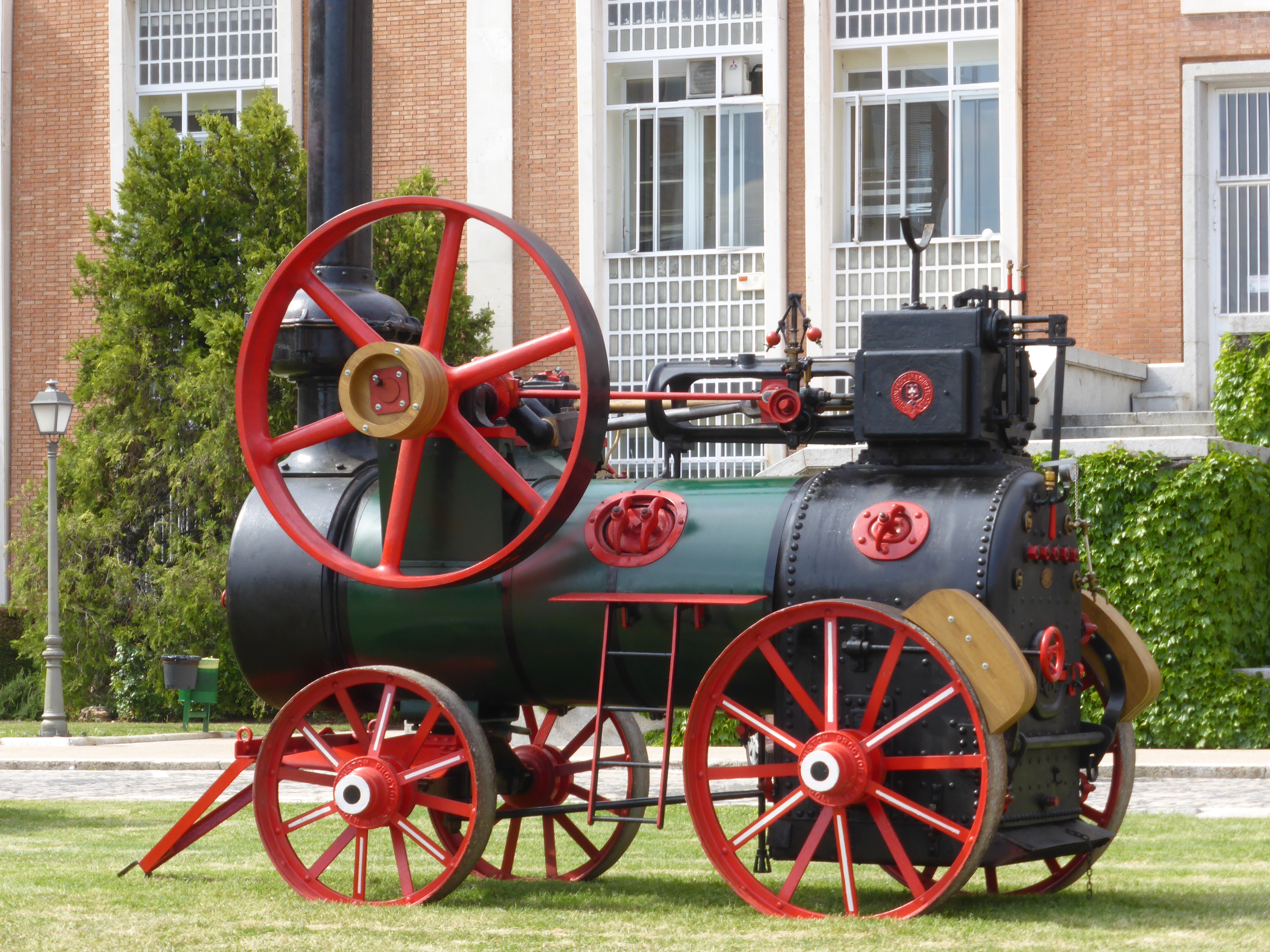 Este antiguo locomóvil agrícola se ha mostrado temporalmente en la "Escuela Técnica Superior de Ingenieros Agrónomos", actualmente llamada: "Escuela Técnica Superior de Ingeniería Agronómica, Alimentaria y de Biosistemas". Ciudad Universitaria de Madrid. Fue construido por "Ruston, Proctor & Cº Ltd", en Lincoln, Inglaterra. Número de fabricación: 32903, según placa. 12HP. Distribuido ("Agentes") por Alberto Ahles & Cía, Madrid, según otra placa.